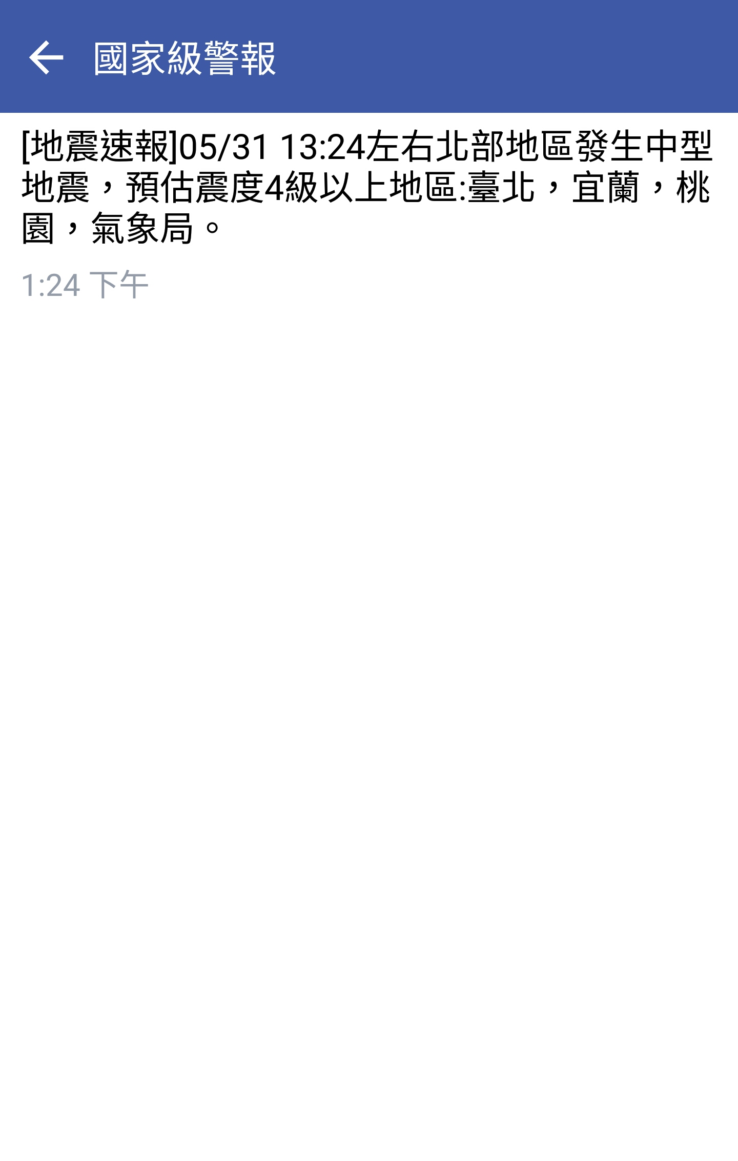 中文（台灣）: 2016年5月31日災防告警細胞廣播訊息系統傳送到手機的國家級警報